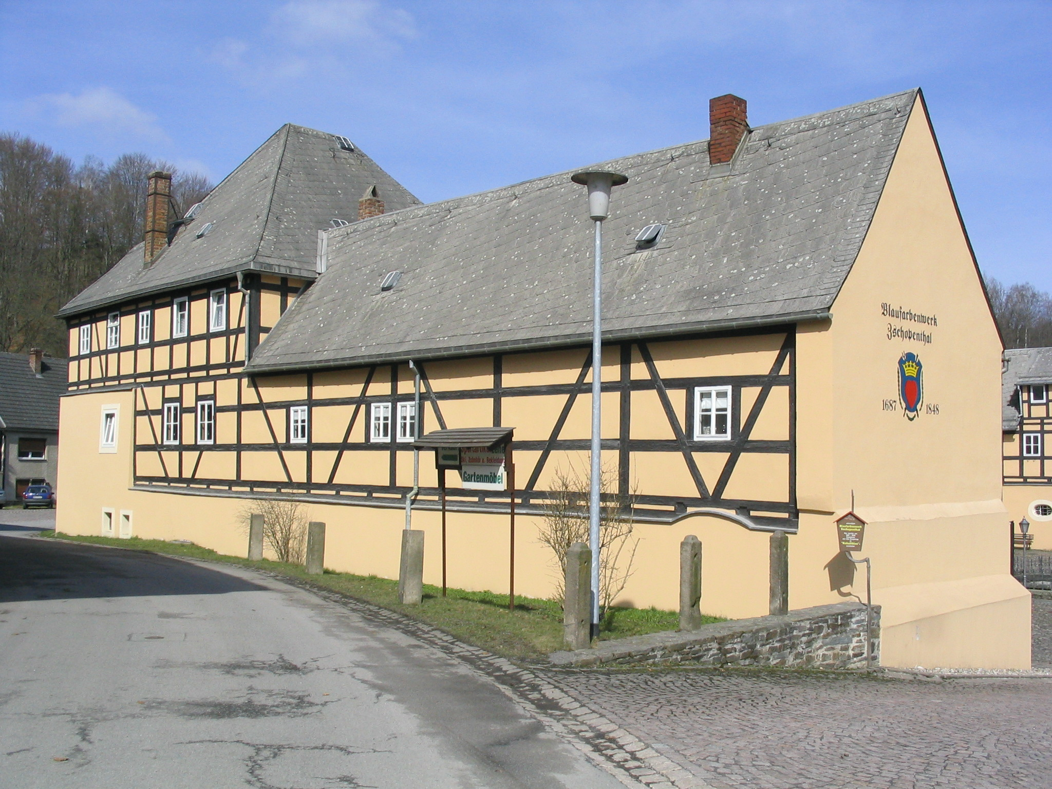 Blaufarbenwerk, vom Eingang zum Hof aus gesehen, aufgenommen am 15.04.2006 von Dr. Hagen Graebner